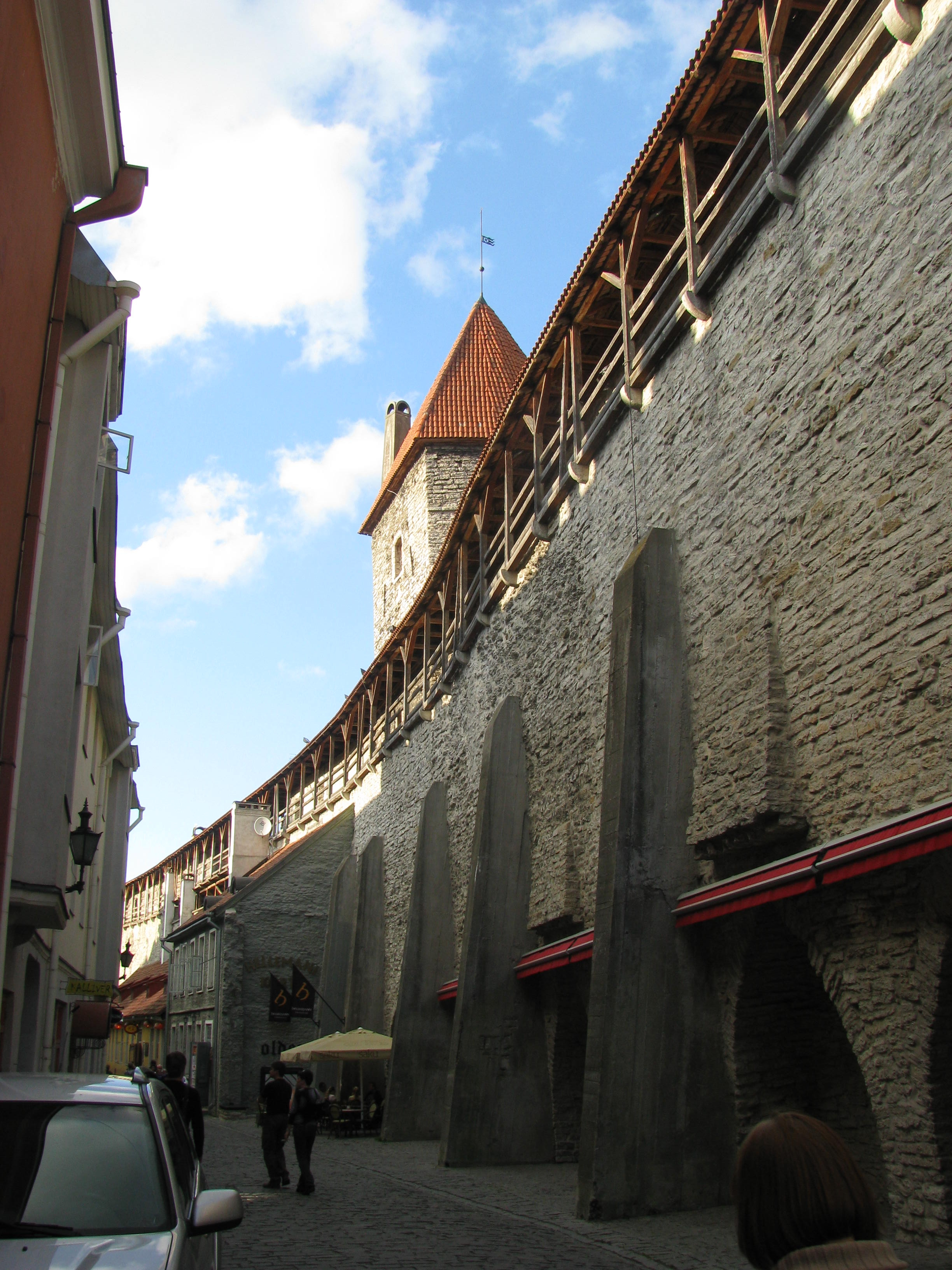 Hellemani torn Müürivahe tänaval, vaade Viru väravate poolt.